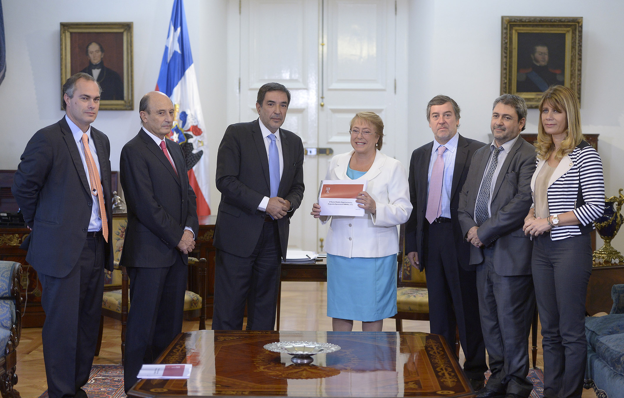 Gobierno de Chile